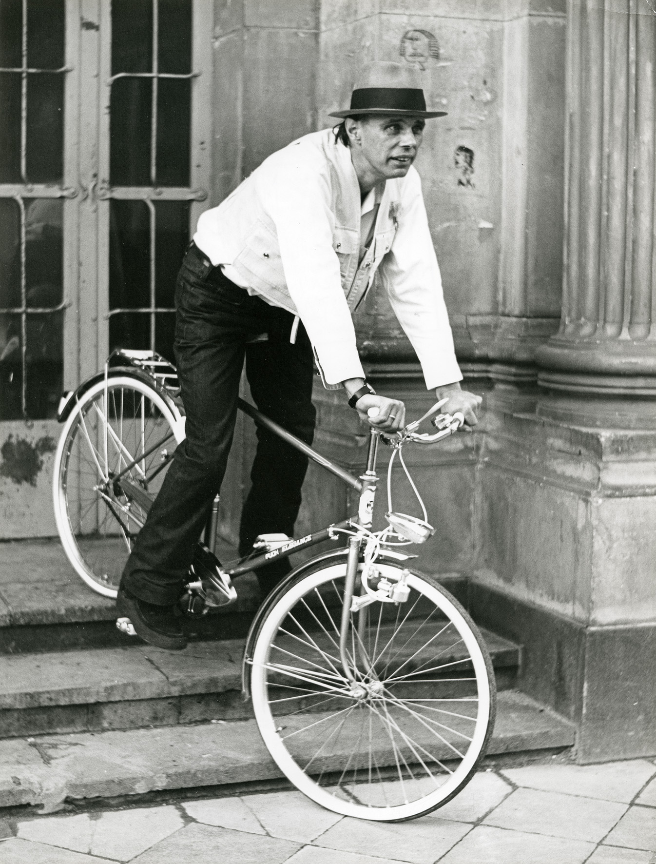 Josph Beuys - mit Fahrrad auf den Stufen des Haupteingangs der Kunstakademie Düsseldorf, aus Bestand: AEKR Düsseldorf 8SL 046 (Bildarchiv), 019_0073